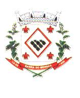 ESTE É O BRASÃO DE ARMAS DO MUNICÍPIO DE BARRA DO MENDES